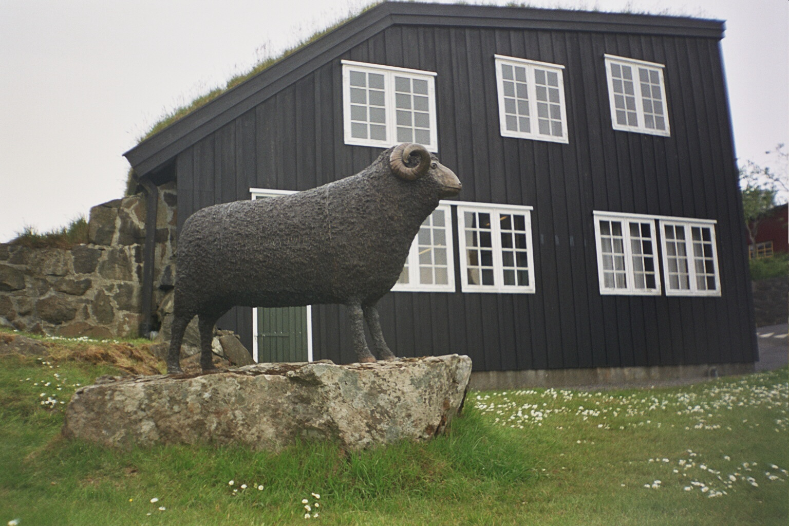 Lamba monument Tórshavnis